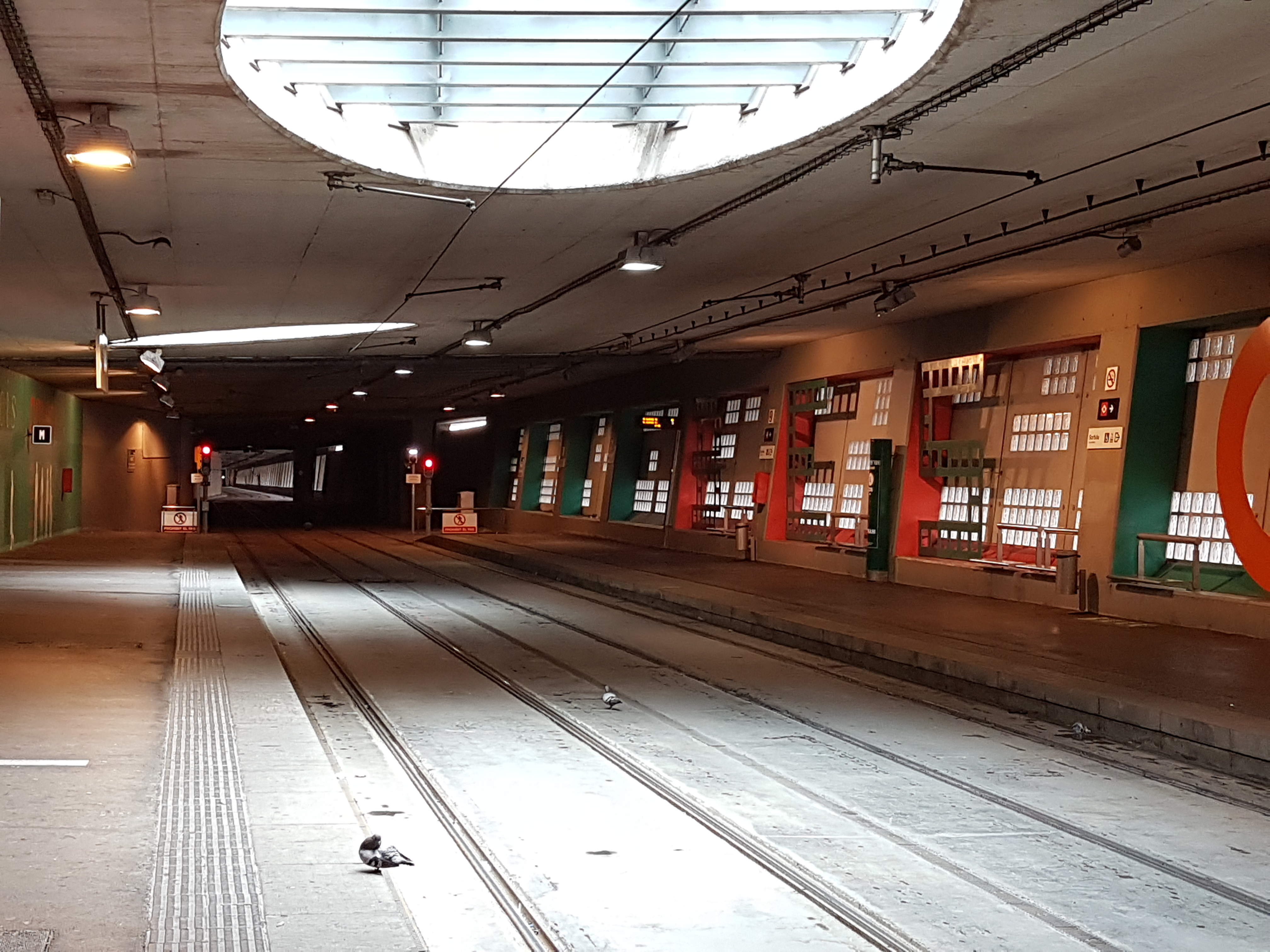 Andanes i vies de l'estació de tramvia de Besòs